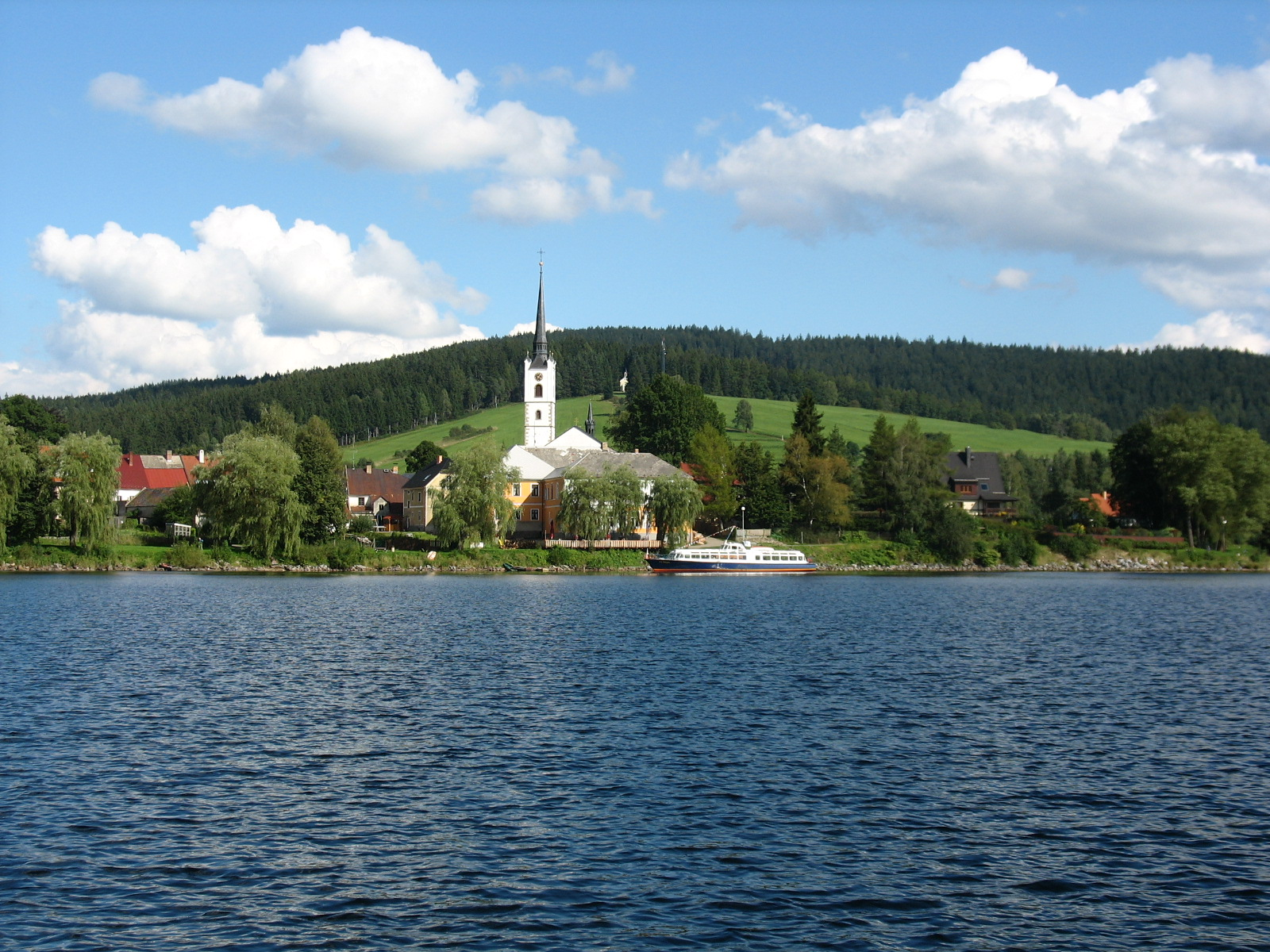 Frymburk s výšinou na Martě při pohledu z hladiny Lipenské nádrže